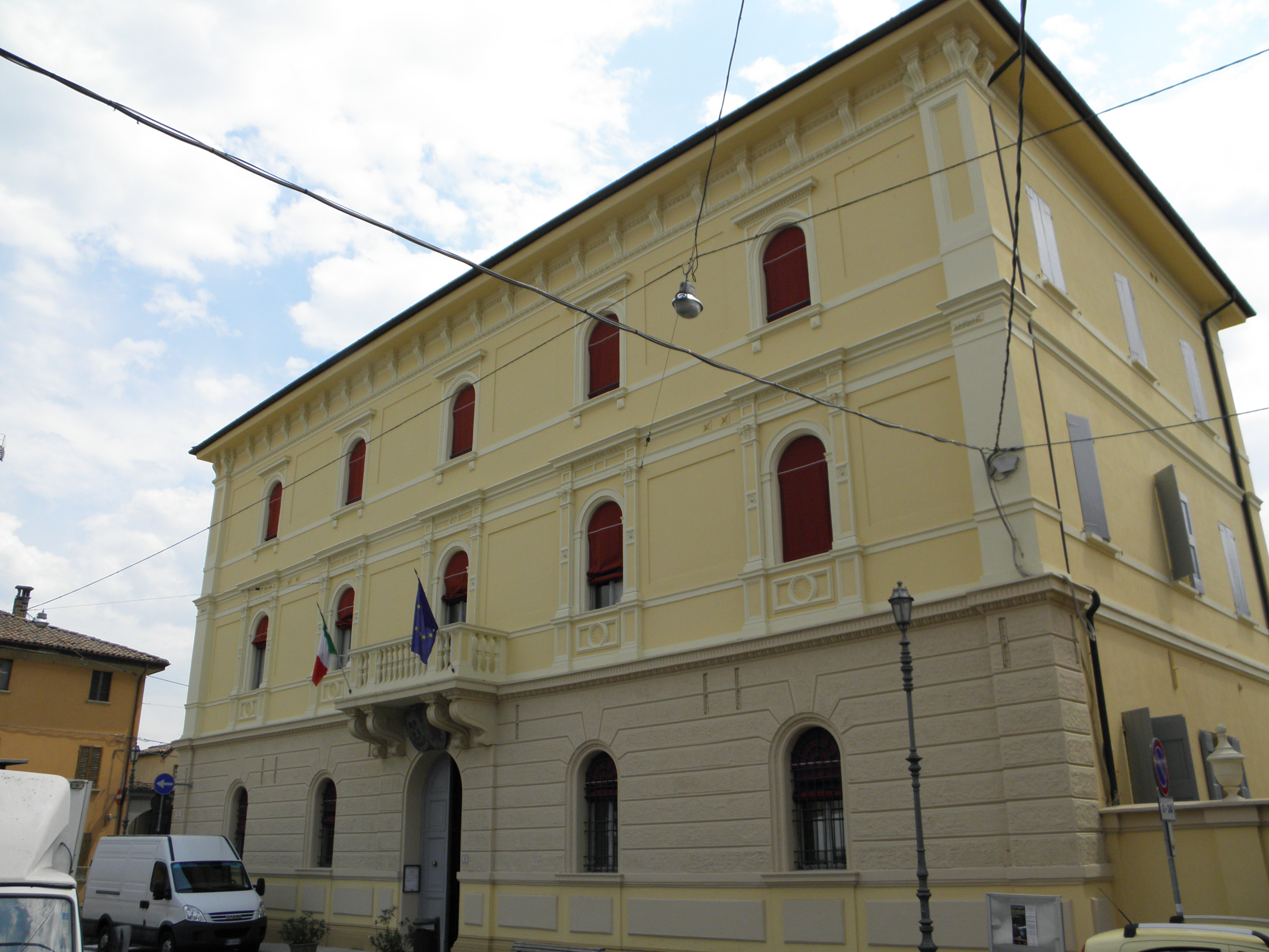 Castello d'Argile, il Palazzo Municipale affacciato a Piazza Gadani.